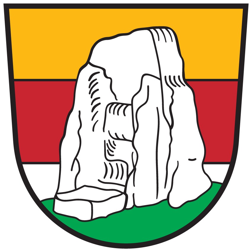 Wappen von Maria Saal